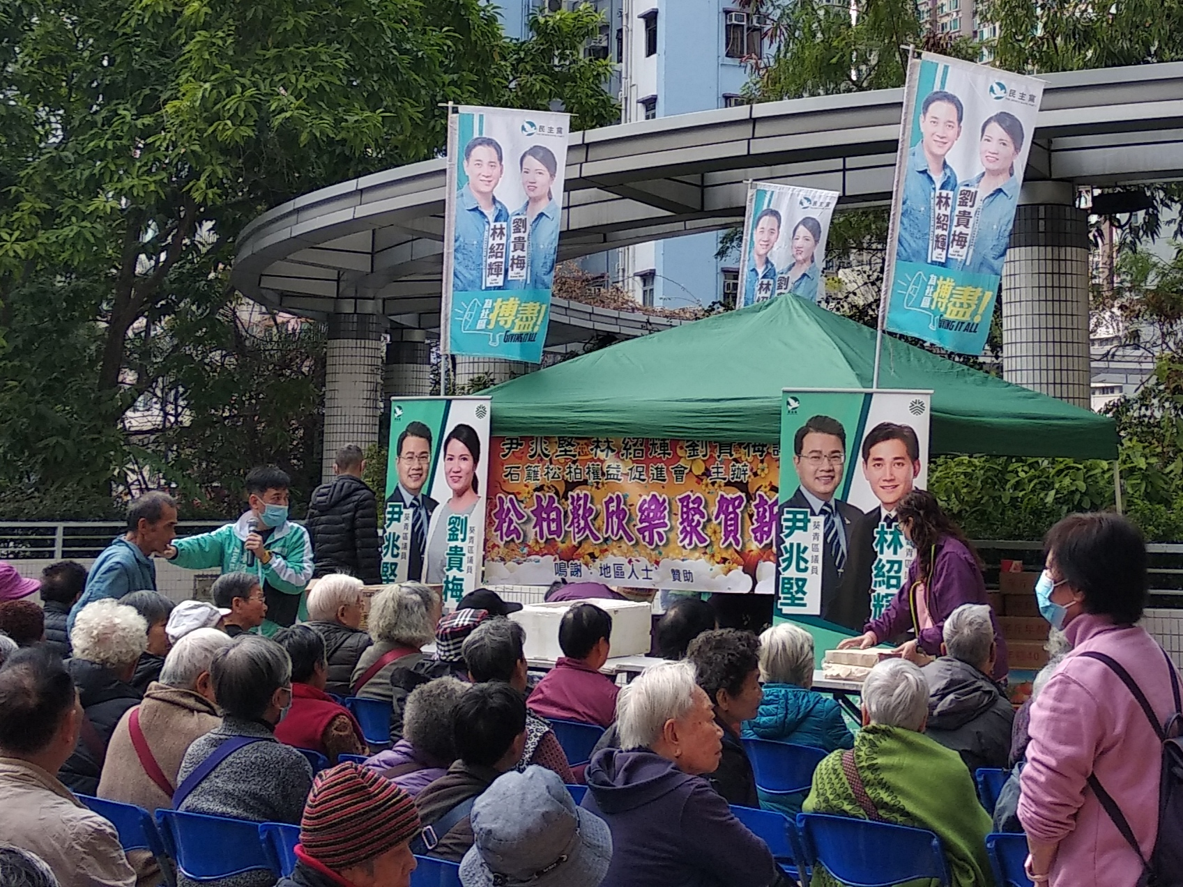 中文（香港）: 農曆新年前的林紹輝（圖左穿綠色上衣者）。